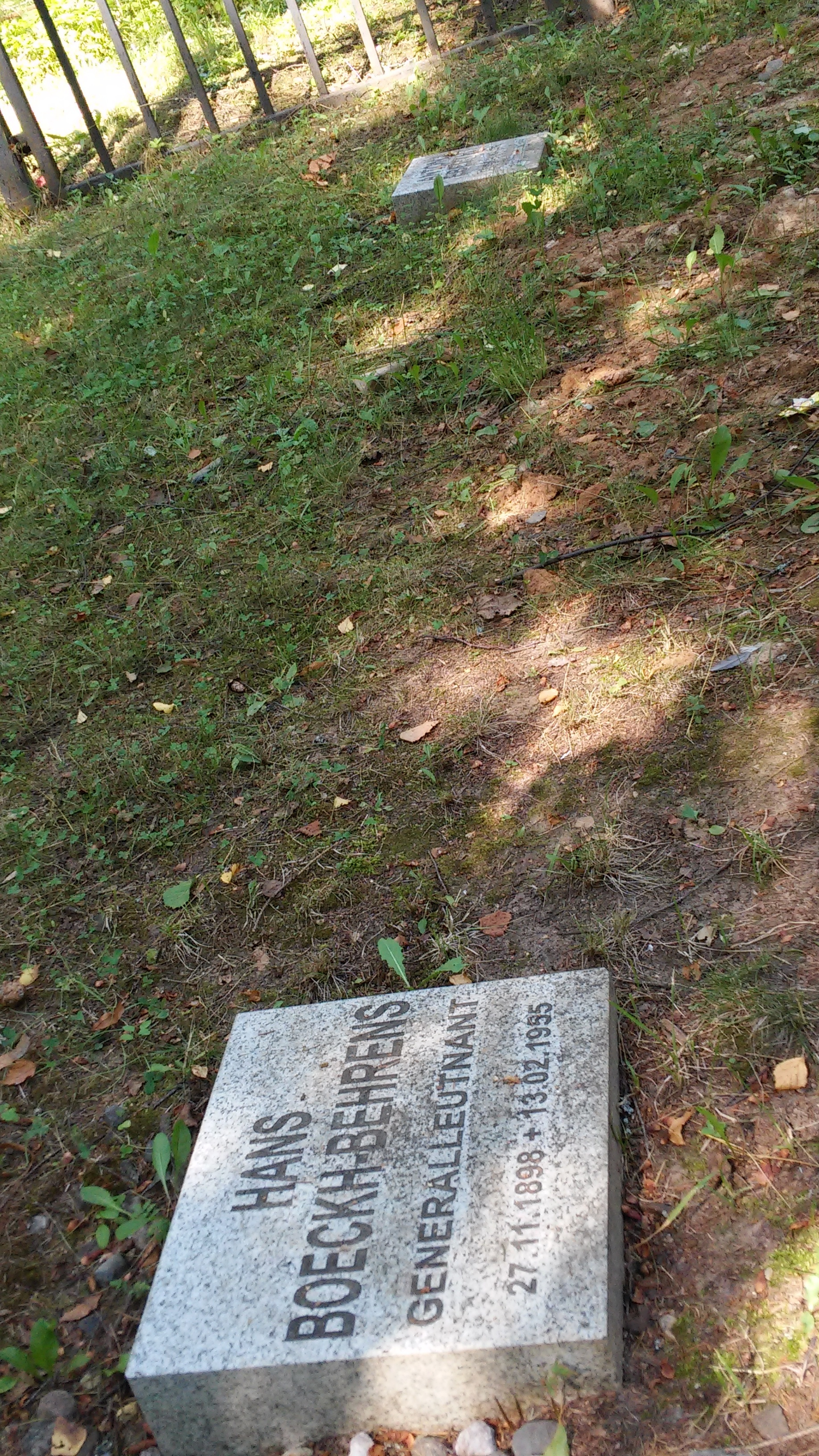 Tombstone; Cherntsy Memorial